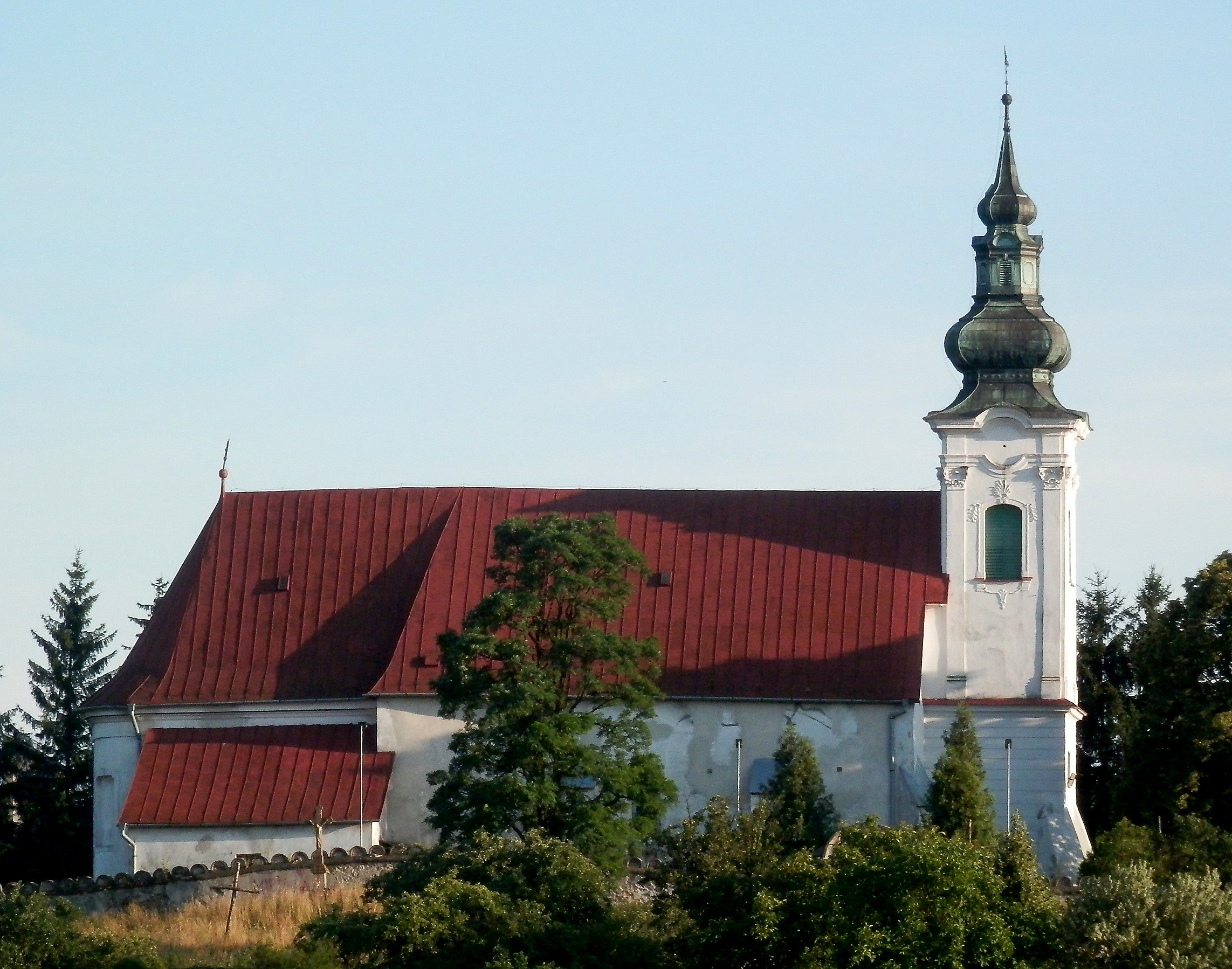 Kostol svätého Štefana. Mesto Prešov-Solivar. Object location48° 58′ 29.61″ N, 21° 16′ 04.59″ E